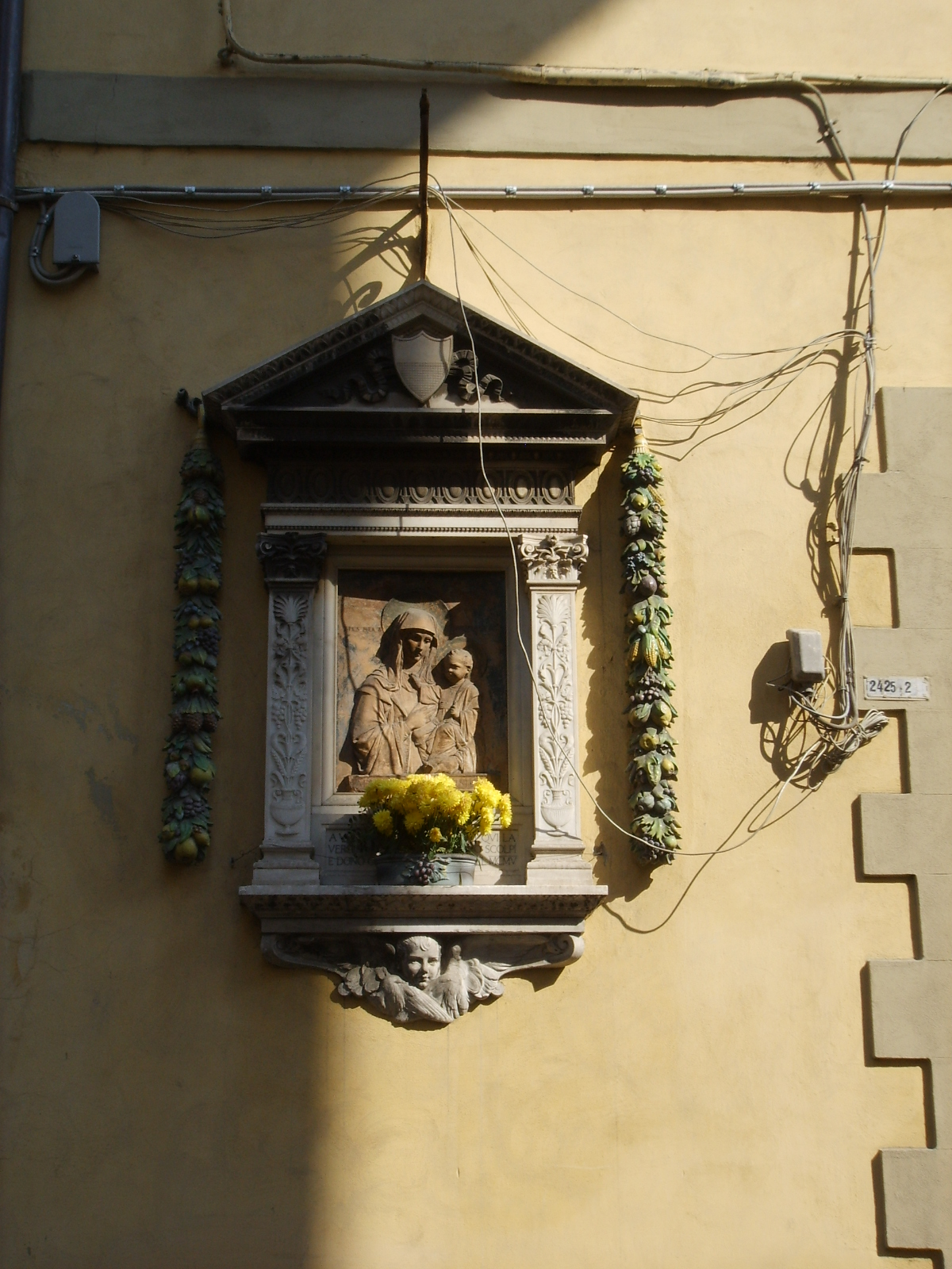 Tabernacolo_borgo_pinti in Florence